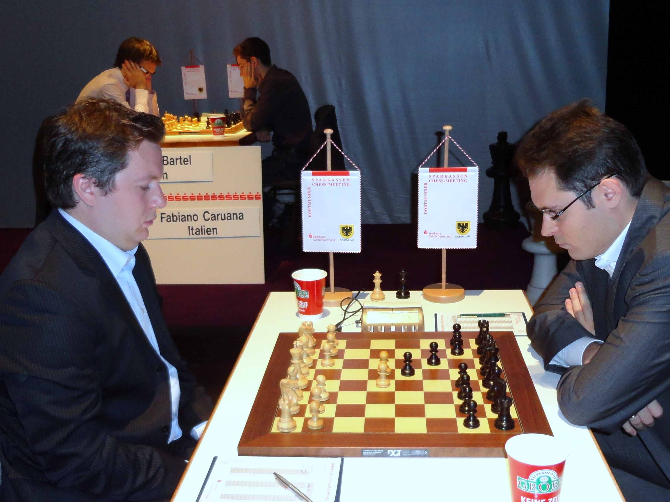 Arkadij Naiditsch und Peter Leko, 9. Runde der Dortmunder Schachtage 2012.